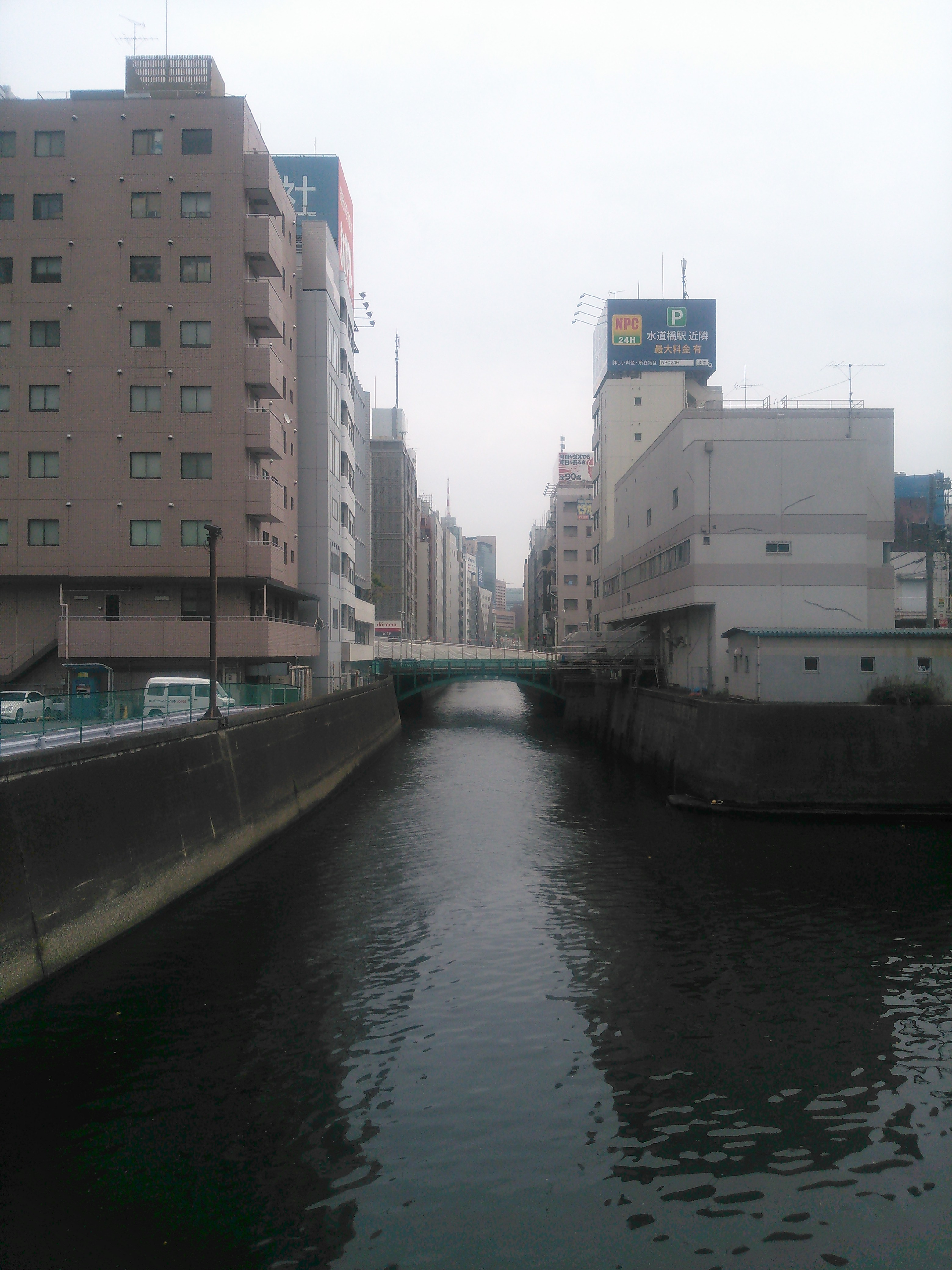 東京の神田川に架かる後楽橋